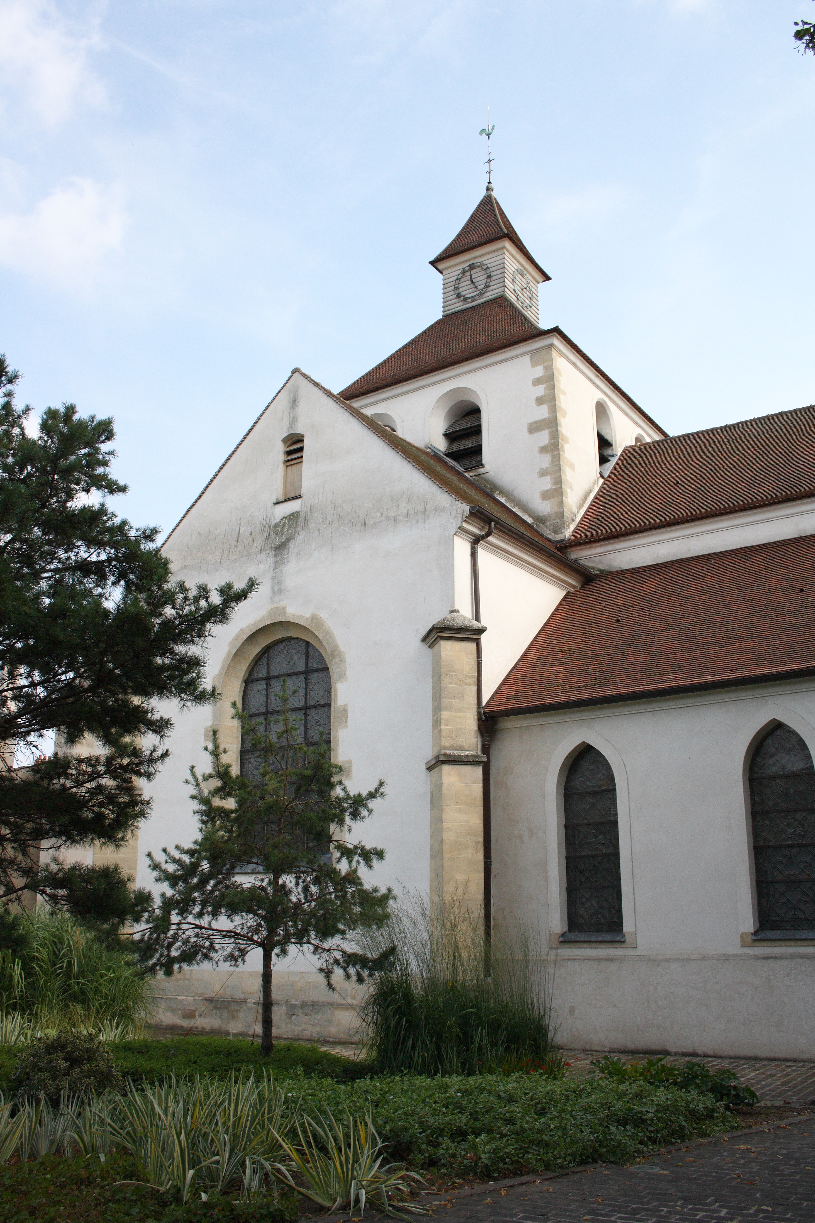 Kirche Saint-Sulpice in Aulnay-sous-Bois im Département Seine-Saint-Denis (Île-de-France